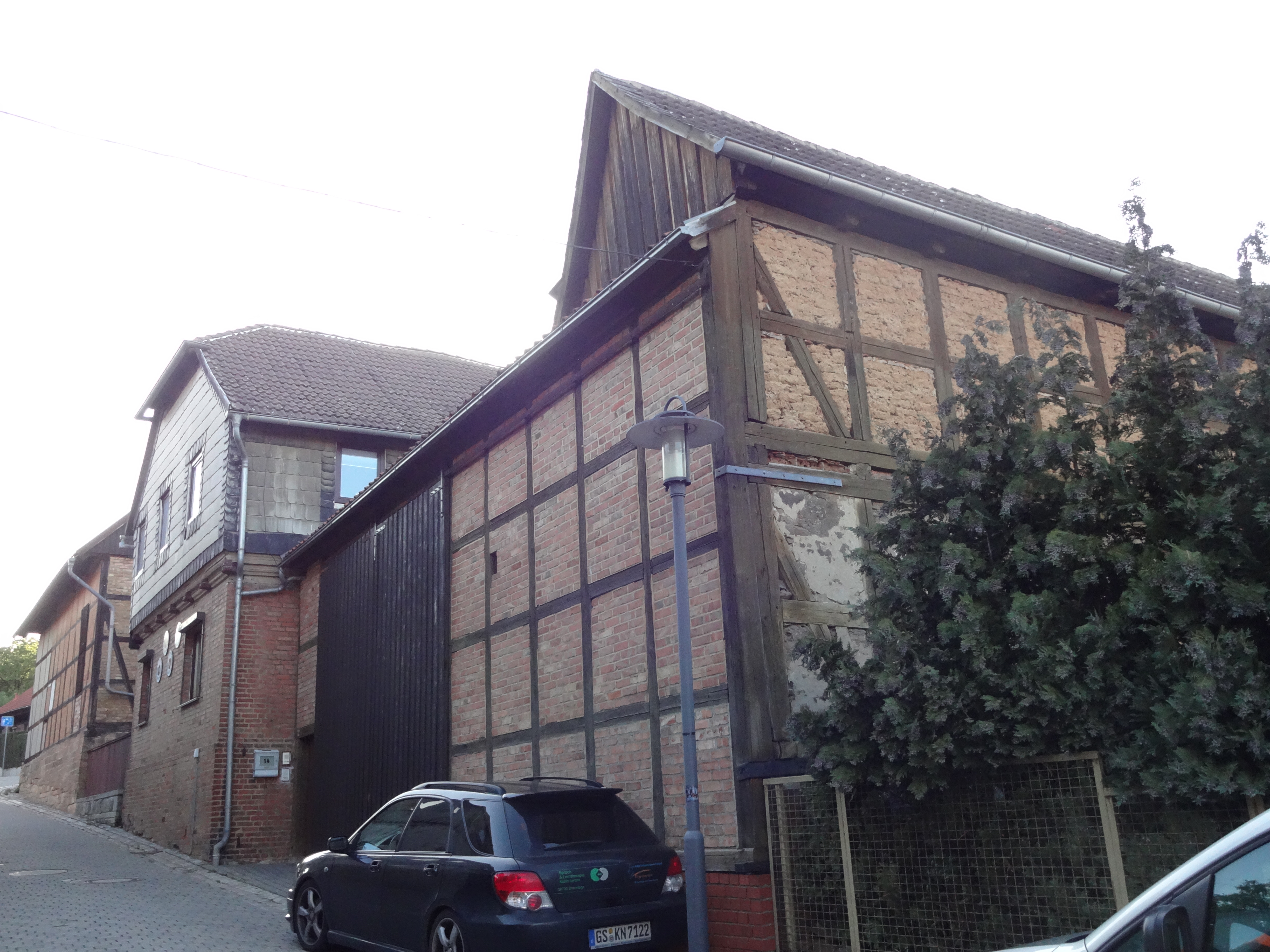 denkmalgeschützter Bauernhof in der Straße Oberdorf 14 in Heimburg